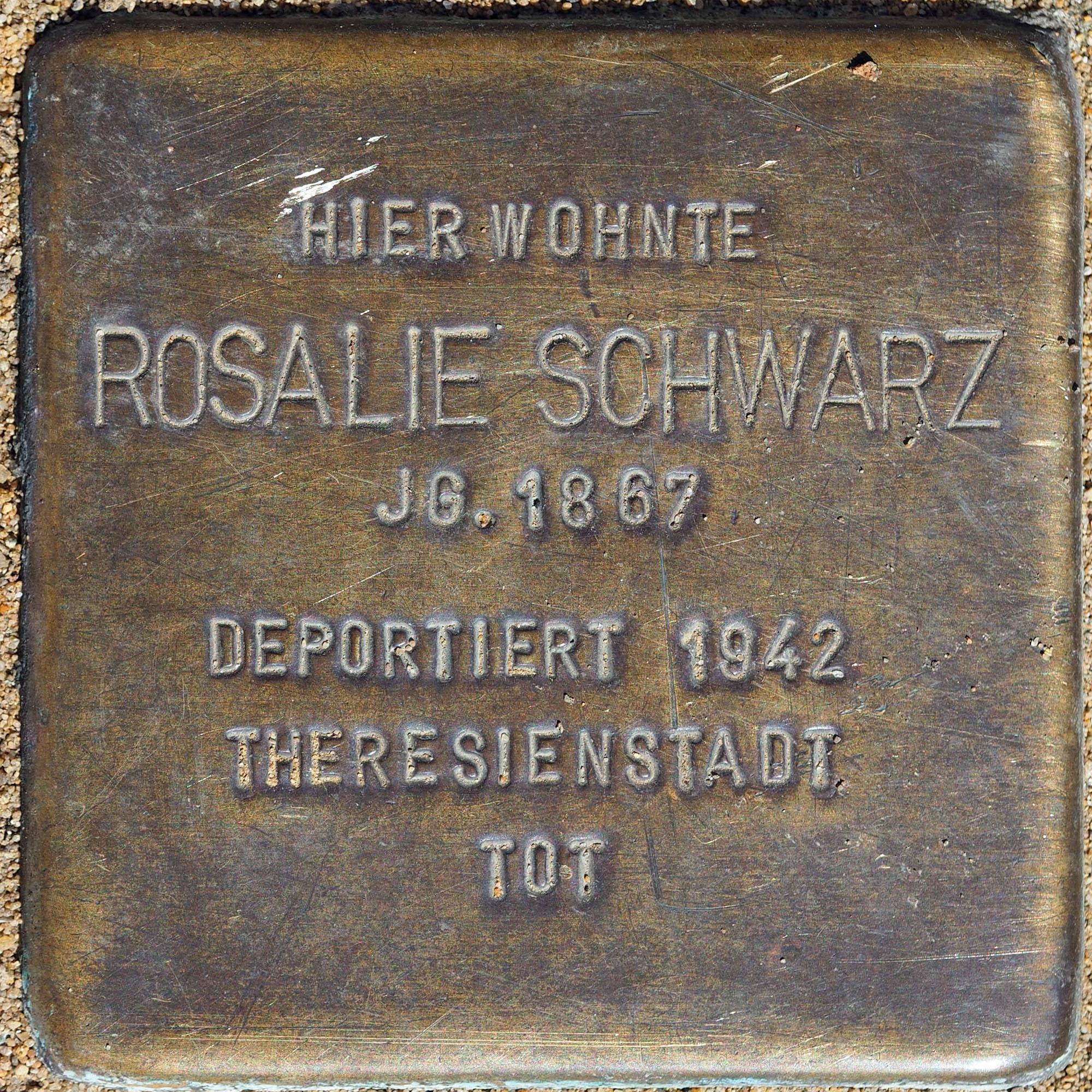 Stolpersteine Korschenbroich: Schwarz, Rosalie